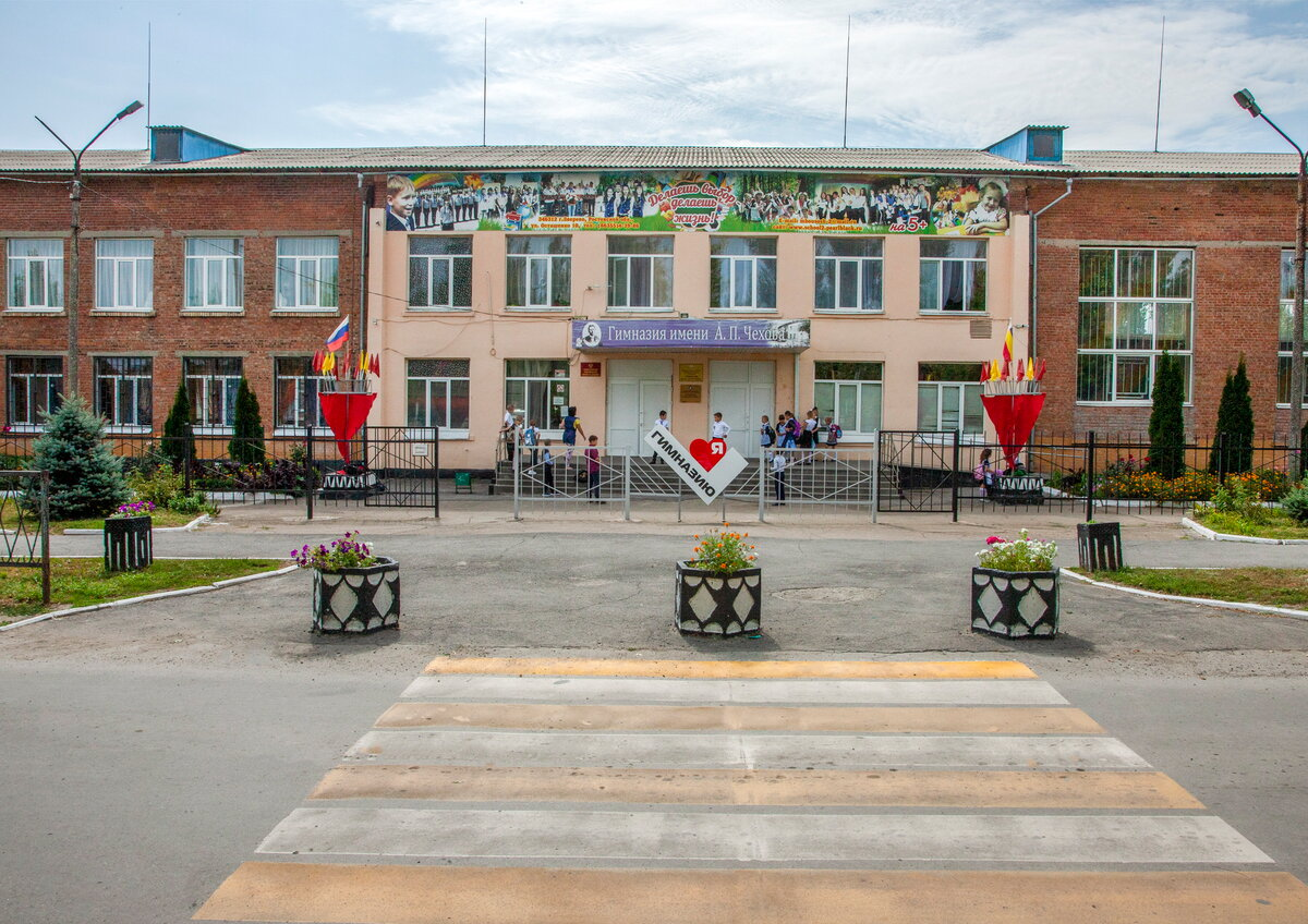 МБОУ "Гимназия им. А.П.Чехова" г.Зверево